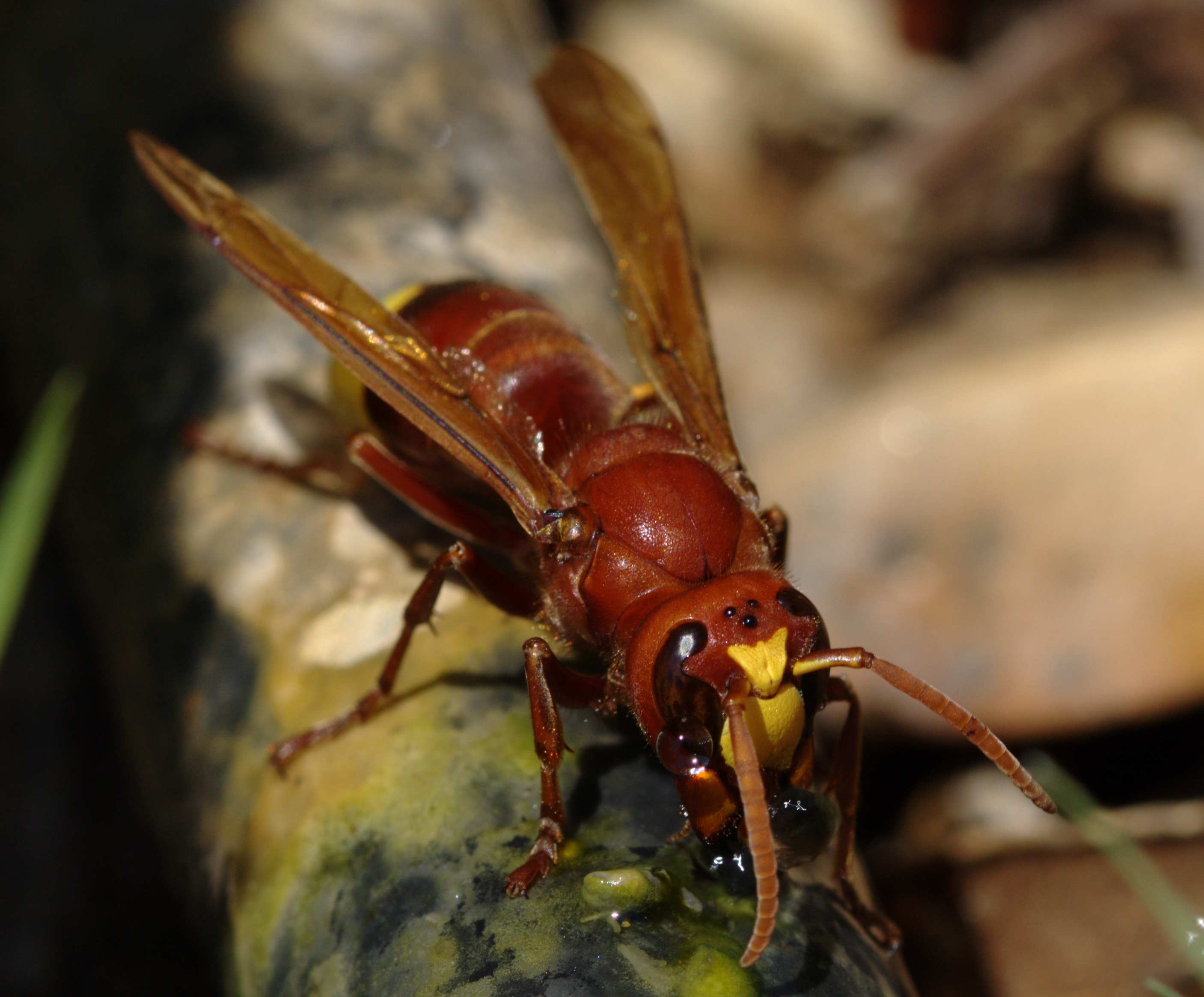 Vespa orientalis drinking water in Samos/Greece